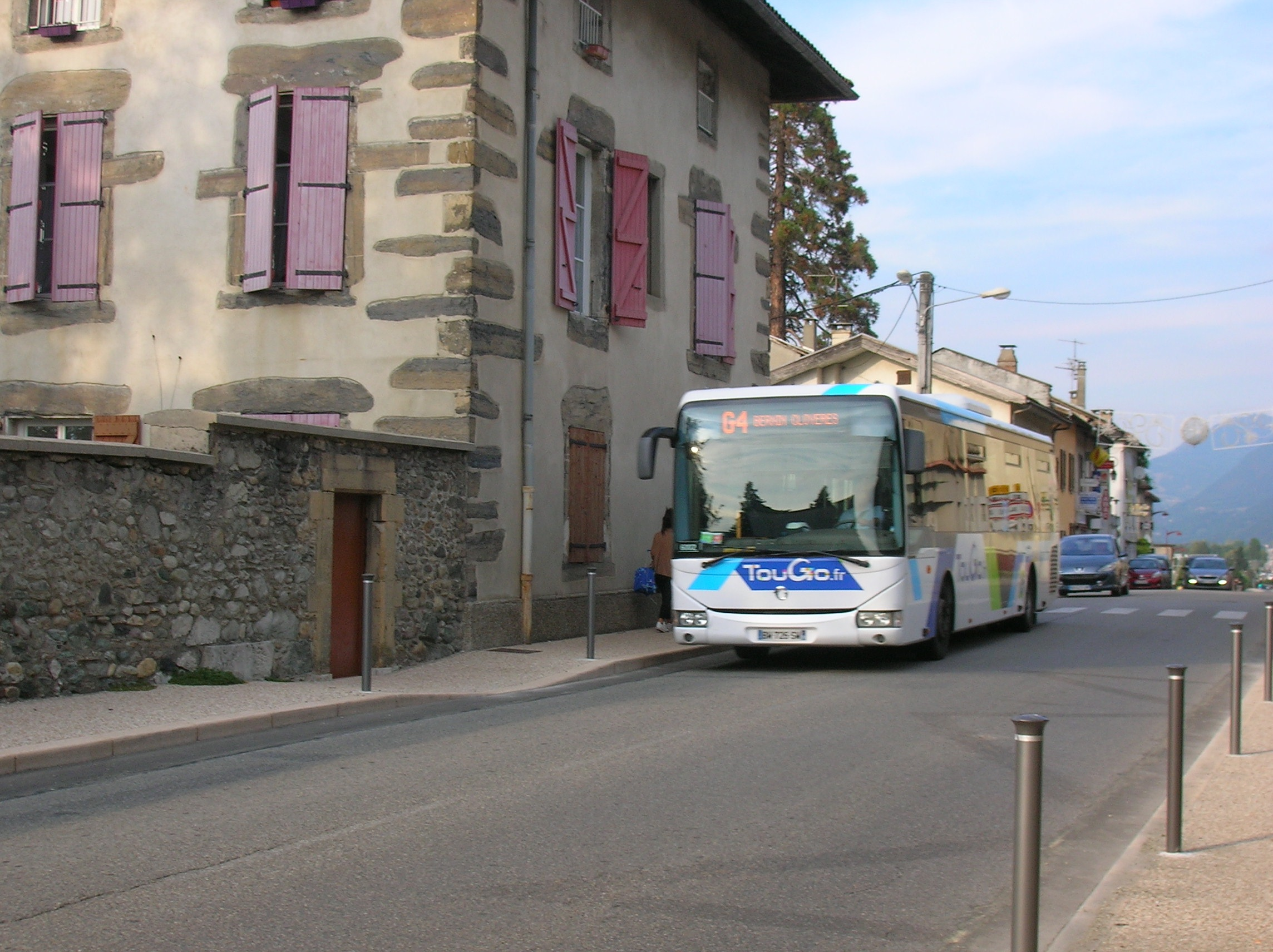 bâtiment ancien et transport en commun, Froges, Isère, AuRA, France.